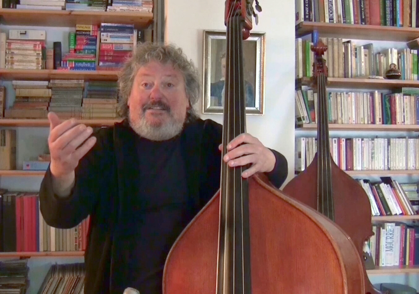 photo interview nov.2014